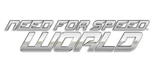 Logo de Need for Speed: World